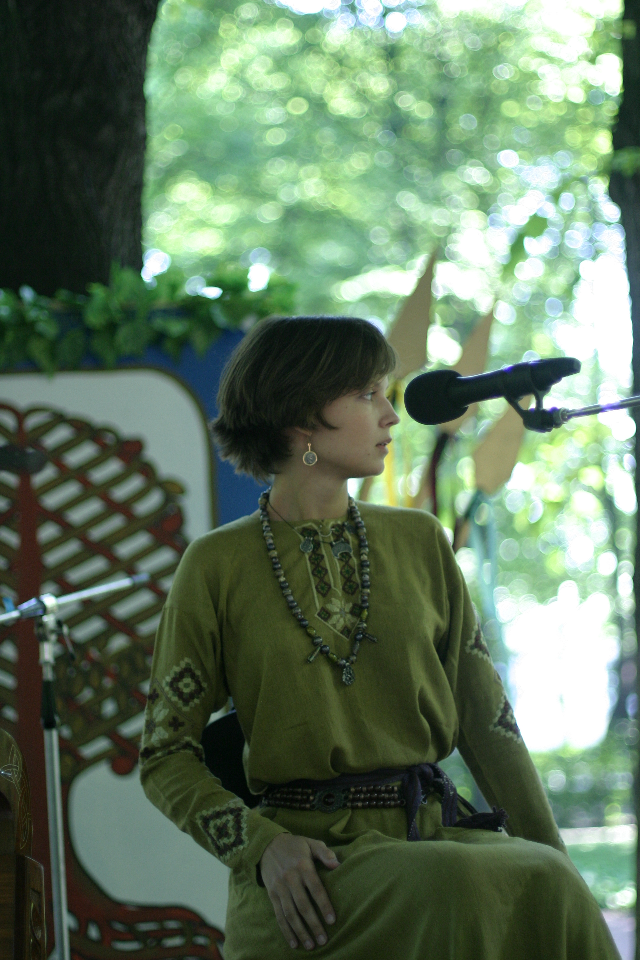 Хелависа (Наталья Андреевна O'Шей). Фотографии от 26.06.2004, фестиваль, приуроченный к 300-летию Летнего сада.